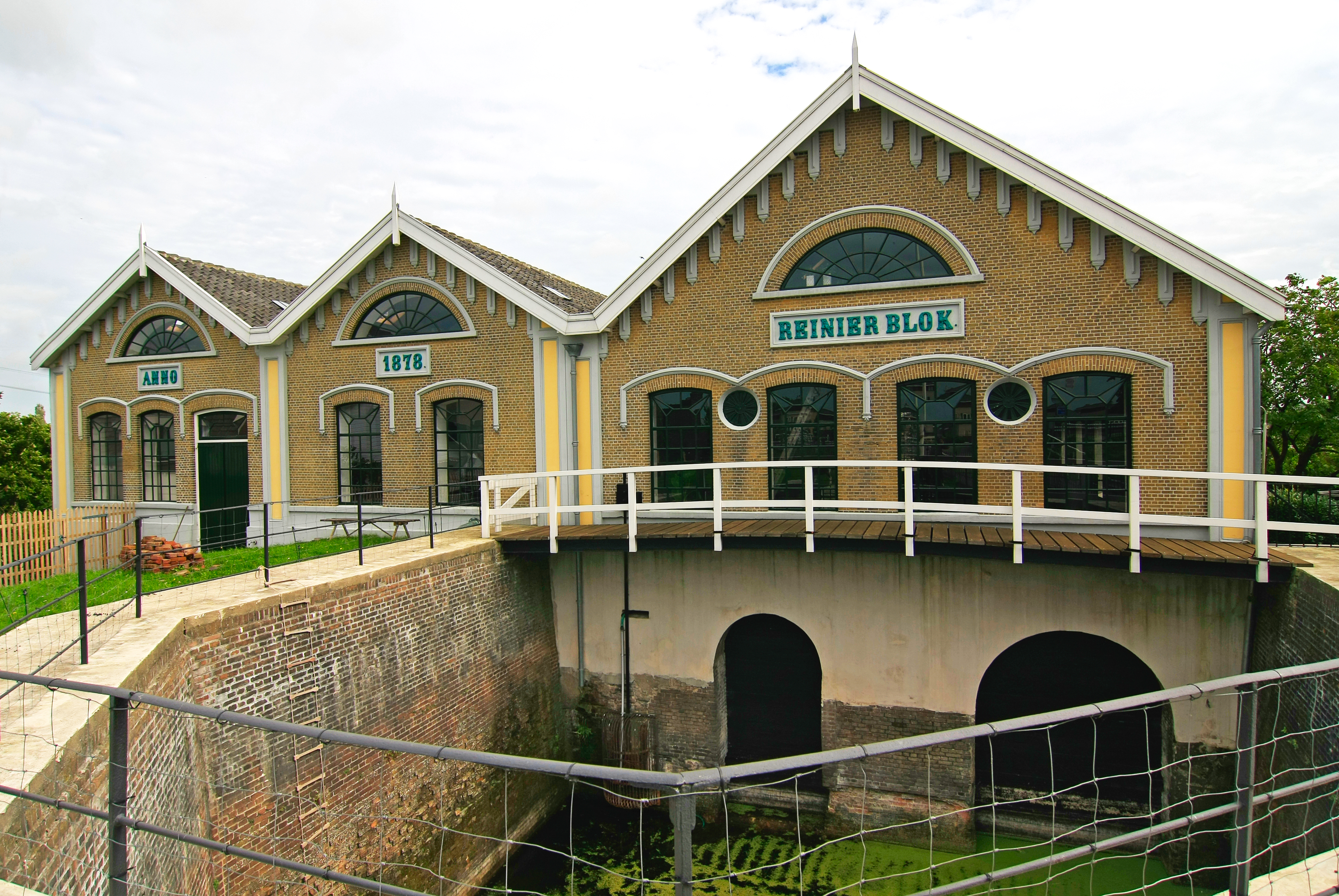 Gemaal Reinier Blok aan de Breekade te Krimpen aan de IJssel